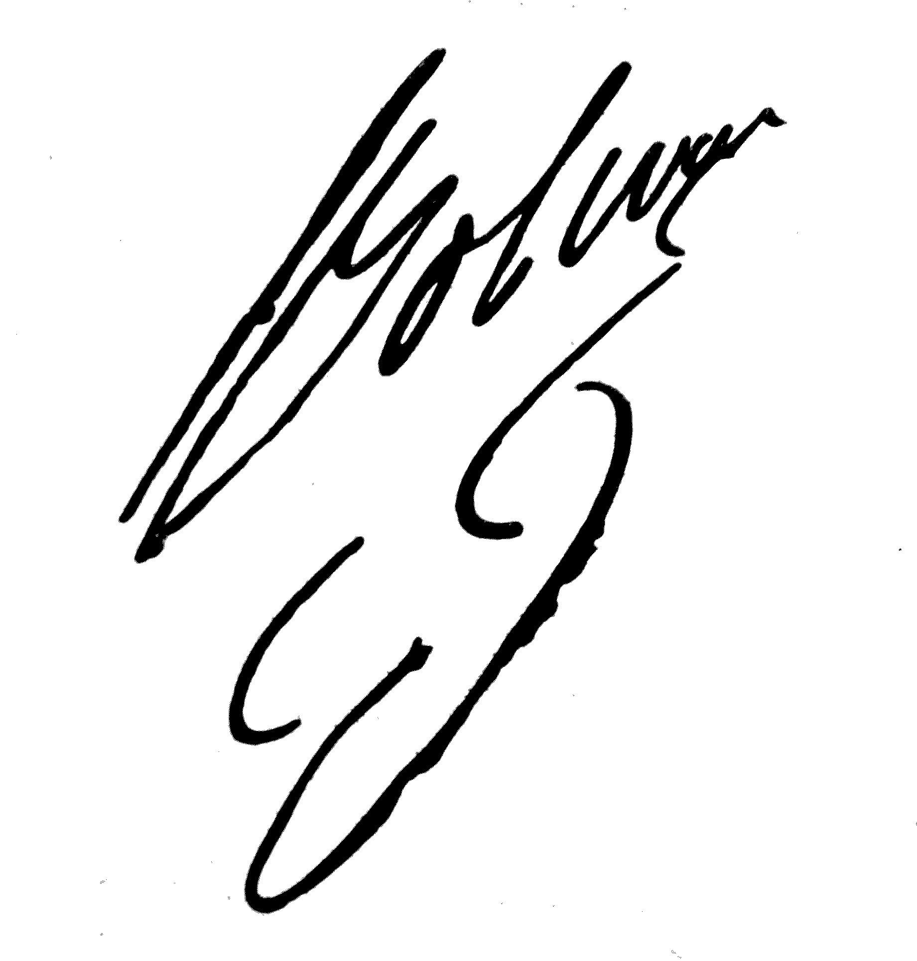 Signatur Simon Bolivar